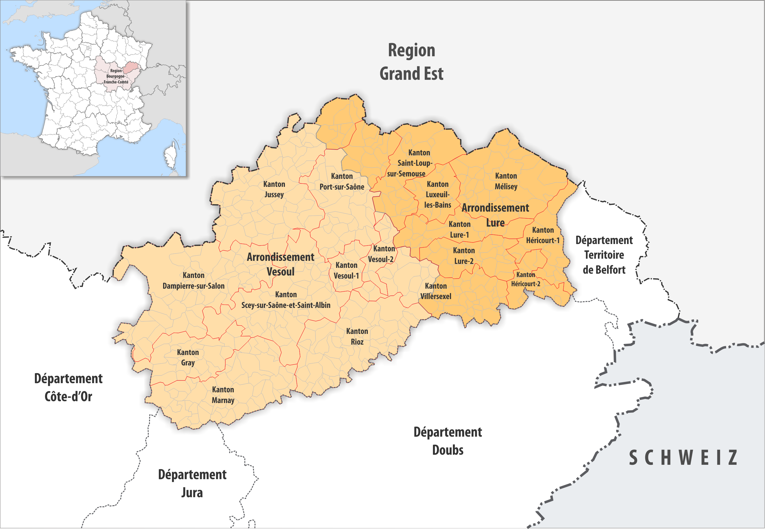 Gemeinden, Kantone und Arrondissemente im Departement Haute-Saône